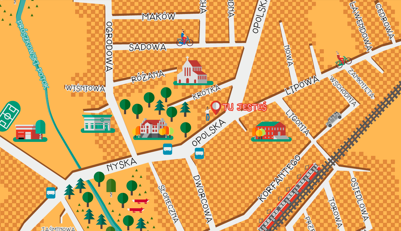 Fragment planu Chmielowic przygotowanego z inicjatywy Towarzystwa Przyjaciół Chmielowic przez Marka Szymczaka przy współpracy Kazimierza S. Ożoga. Plan o wymiarach 2x3 m został zamontowany w centrum wsi w połowie sierpnia 2015.